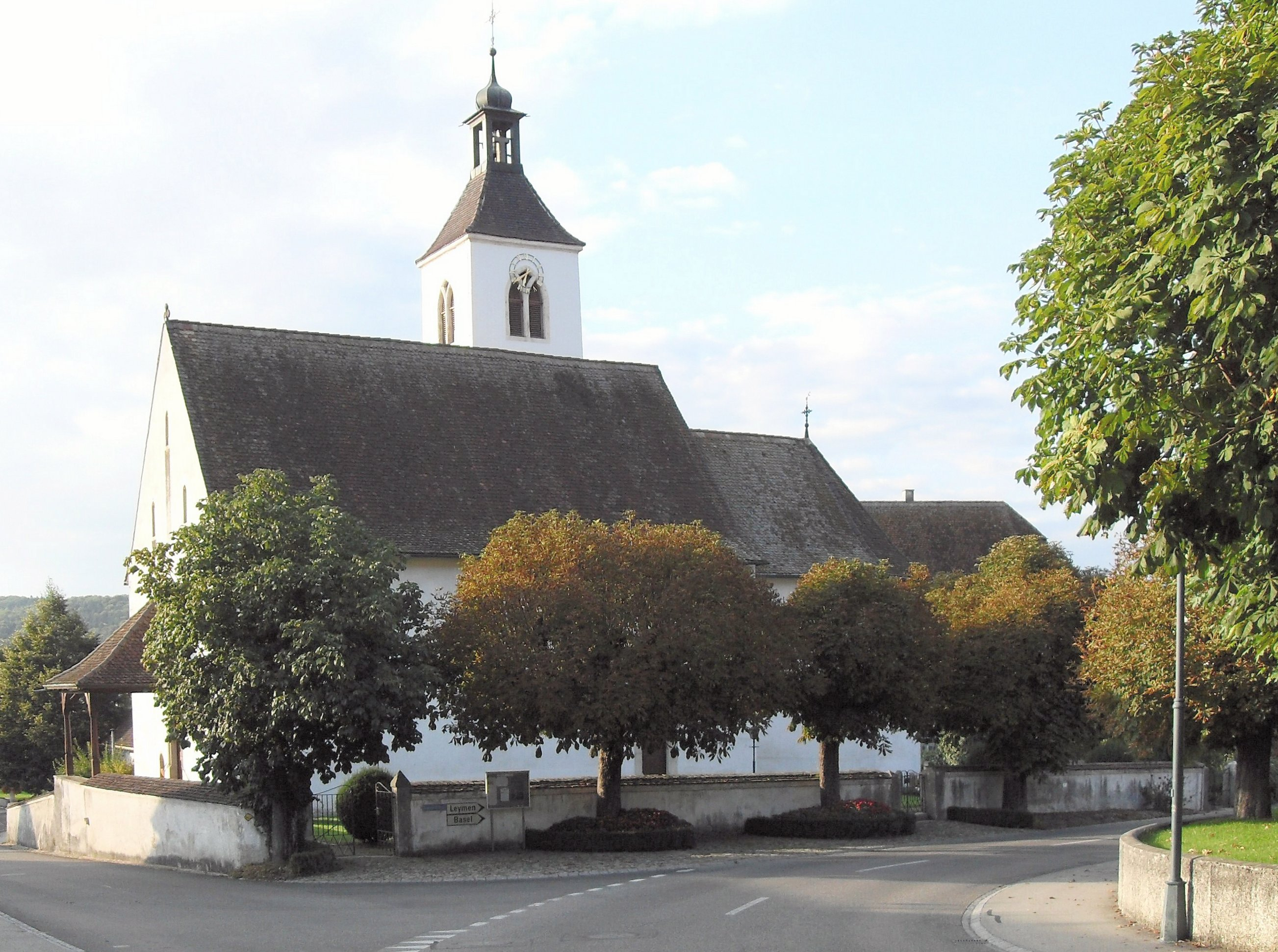 Katholische Pfarrkirche St. Laurentius in Rodersdorf, Kanton Solothurn, Schweiz